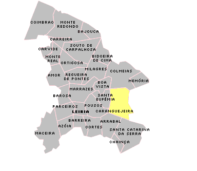 Localisation de Caranguejeira.PNG sur la freguesia de Leiria.